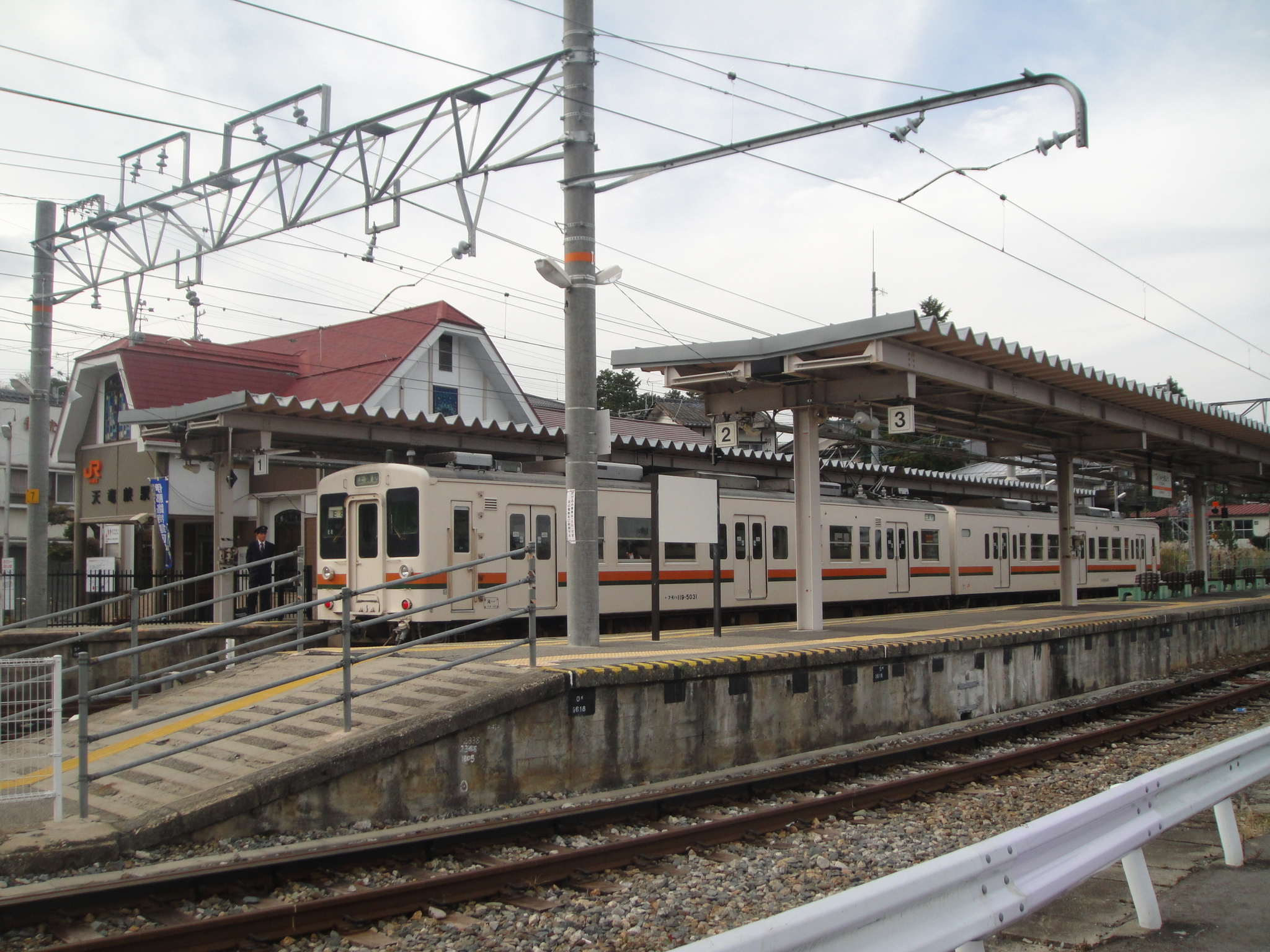 長野県飯田市川路天竜峡にある、東海旅客鉄道（JR東海）飯田線の天竜峡駅のホームと車両。